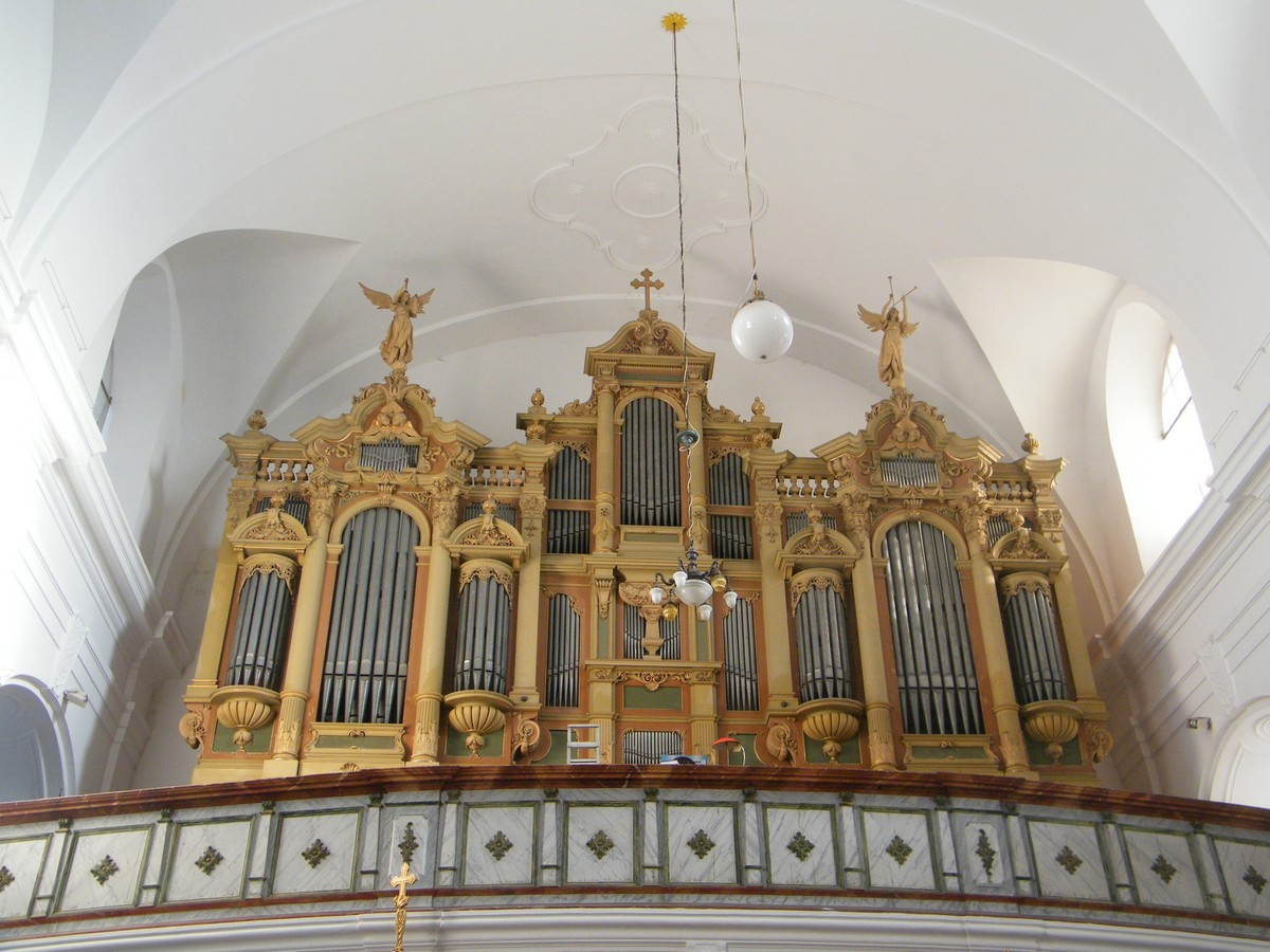 Varhany v kostele svatého Mikuláše v Mikulášovicích